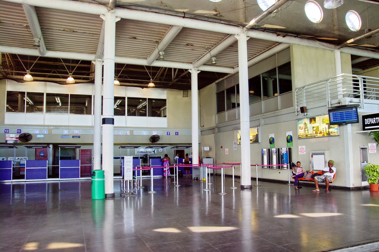 Zugang Abflughalle Crownpoint Airport Tobago